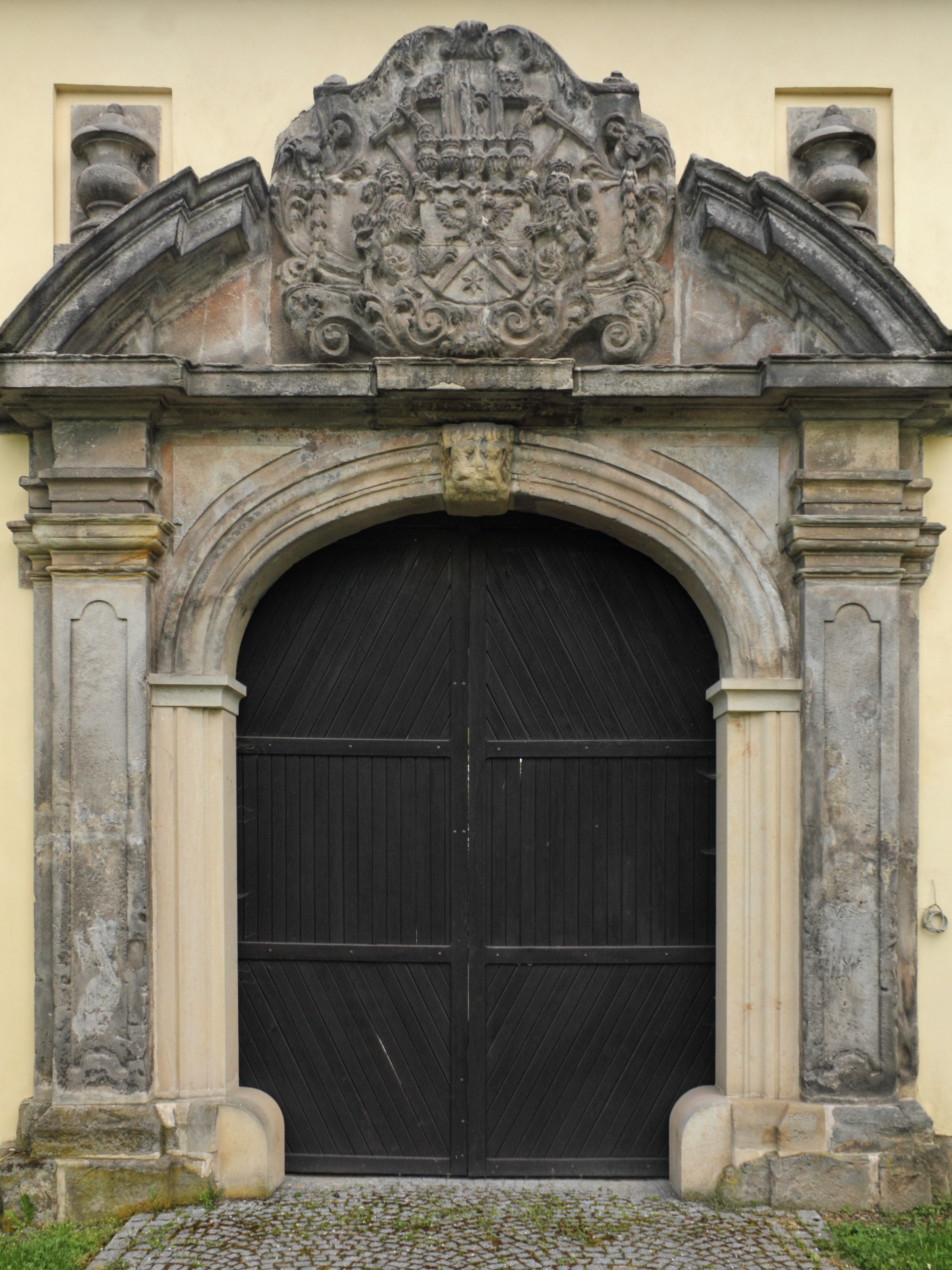 Jenišovice, okres Jablonec nad Nisou